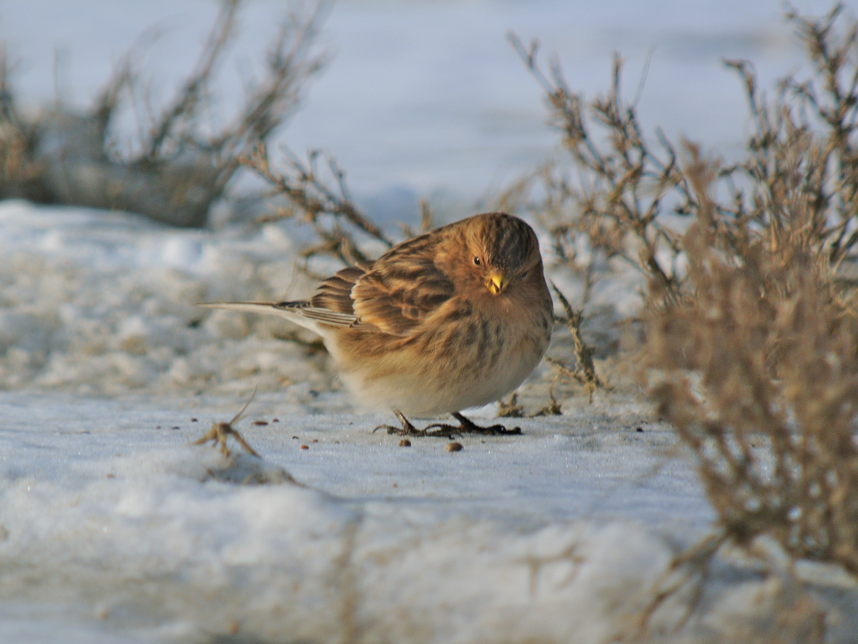 Twite Carduelis flavirostris, Kwade Hoek, Netherlands